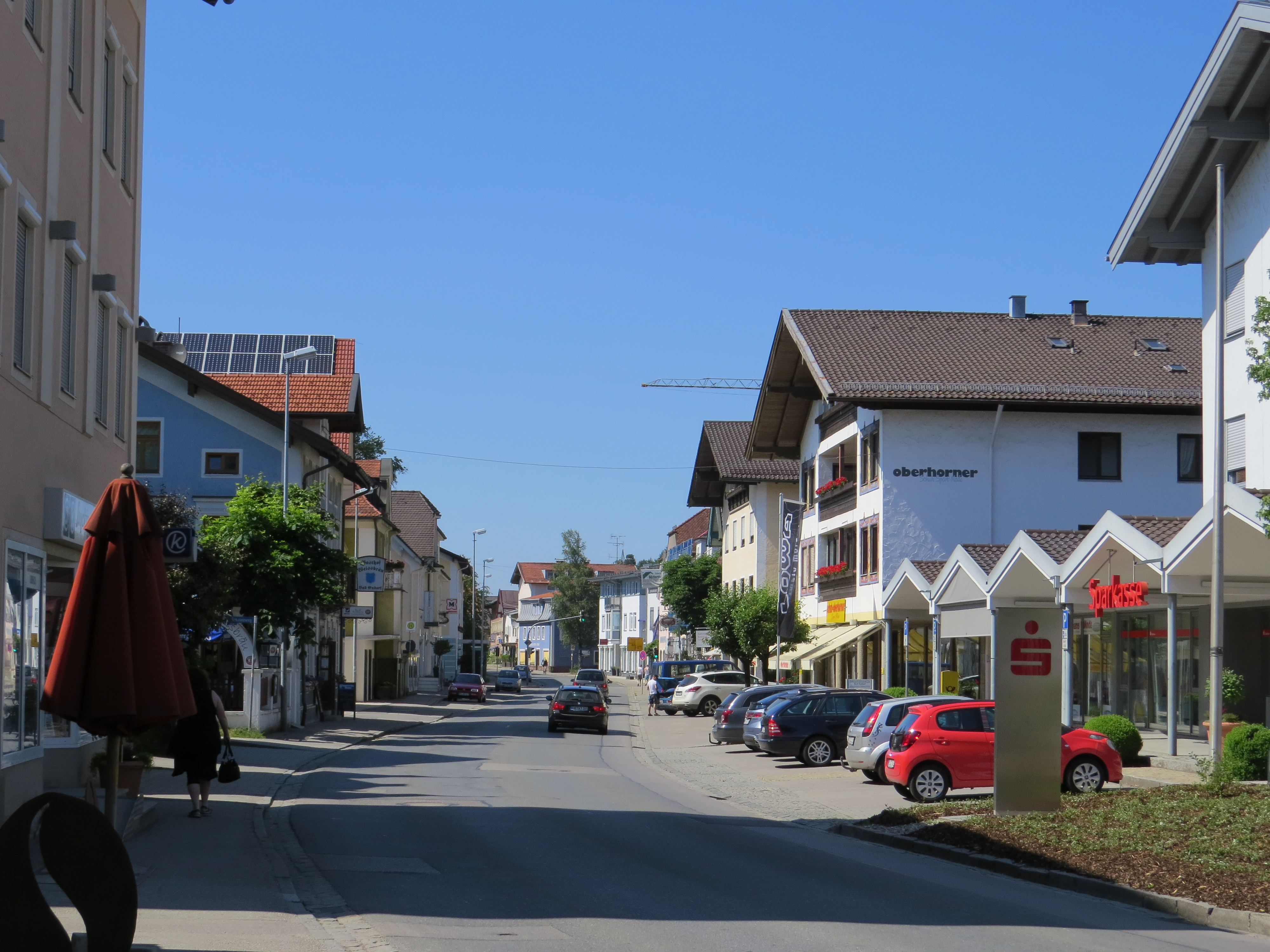 Bahnhofstr. in Bad Endorf